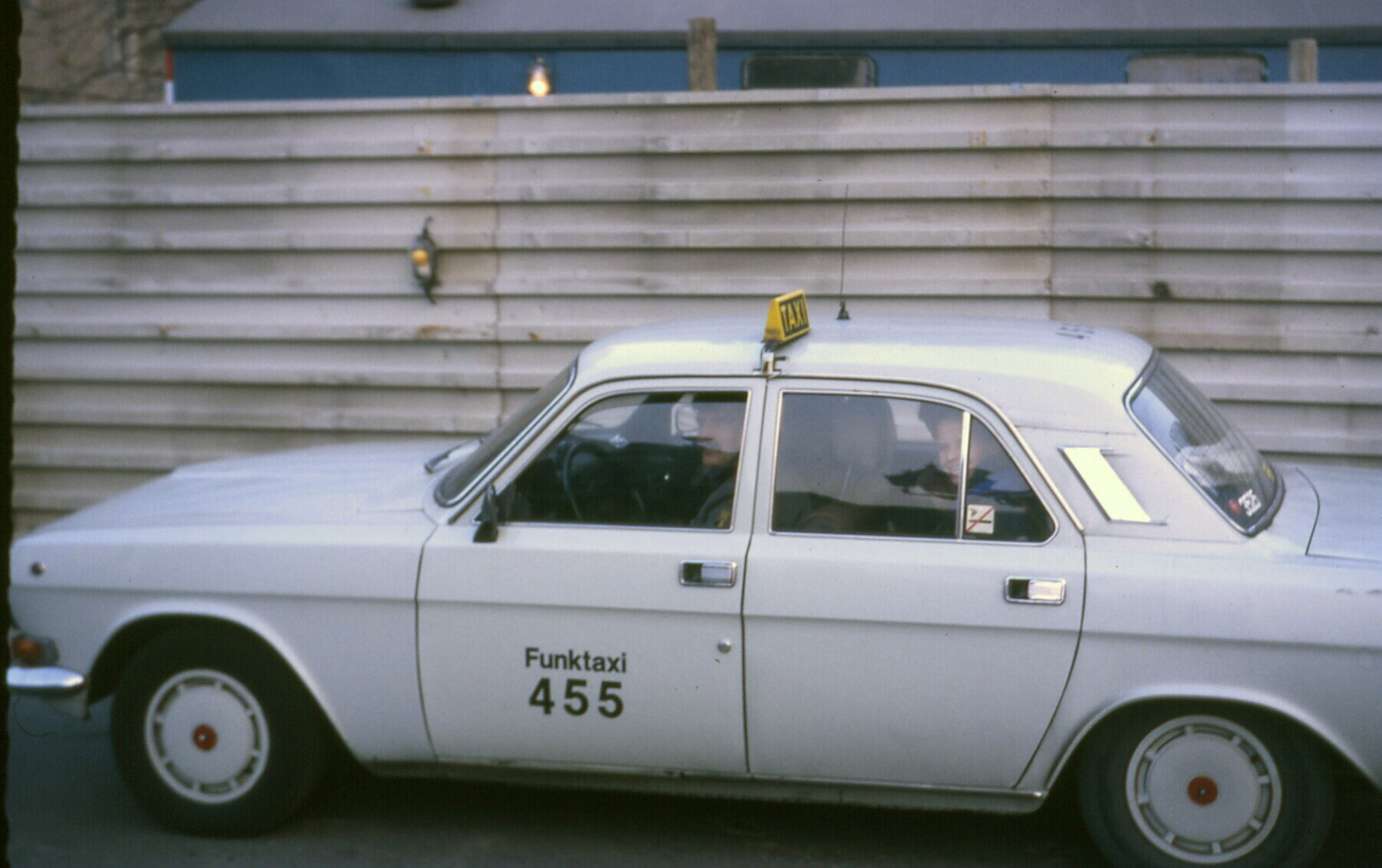 Ostberliner Taxi 1989 kurz nach der Maueröffnung